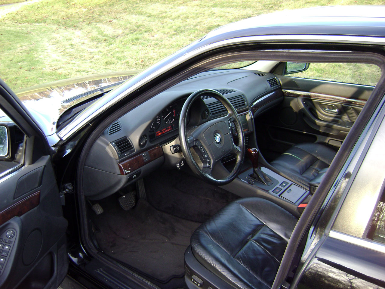 BMW 740iA -96